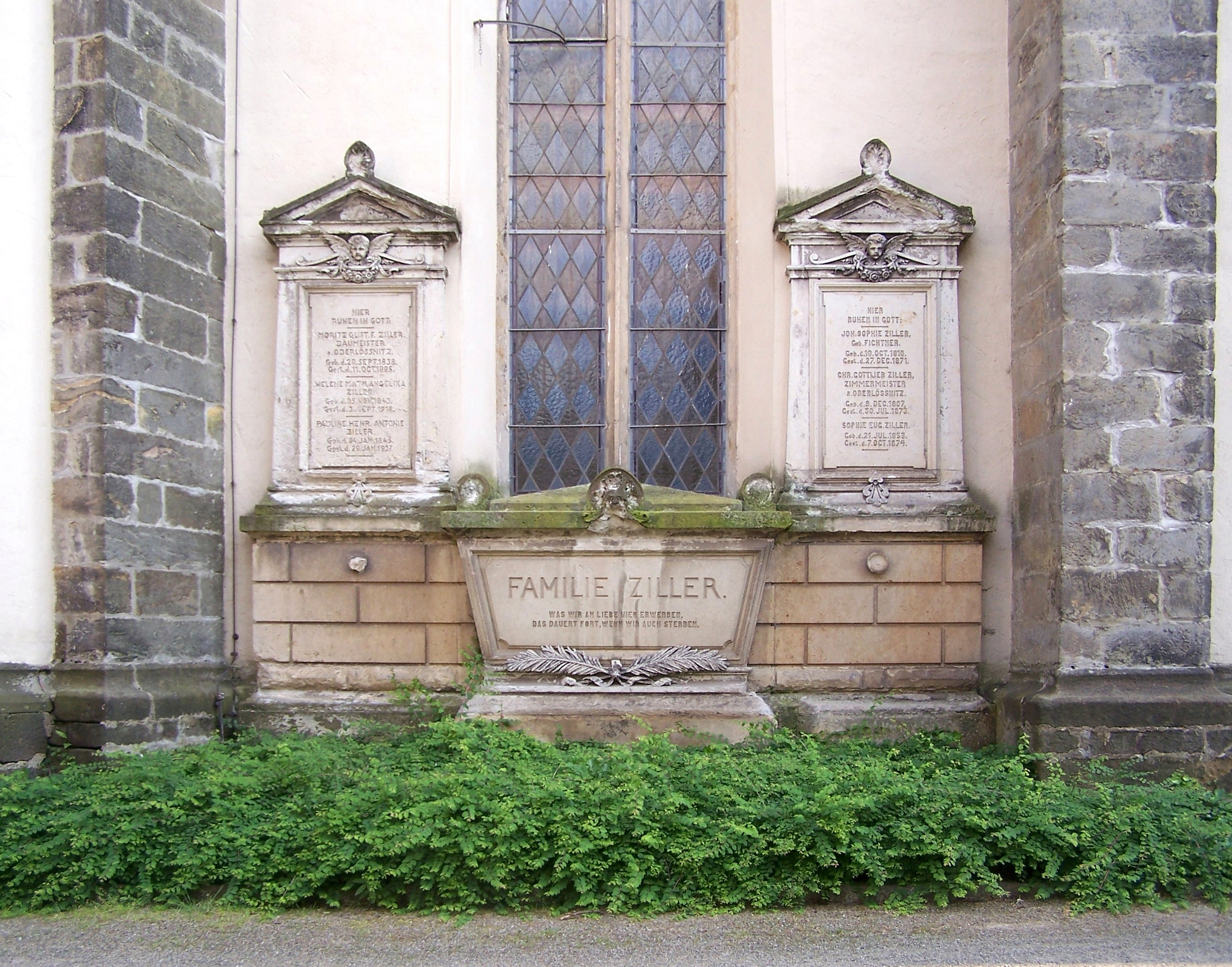 Familiengrab Ziller auf dem Kirchhof der Emmauskirche in Dresden-Kaditz.